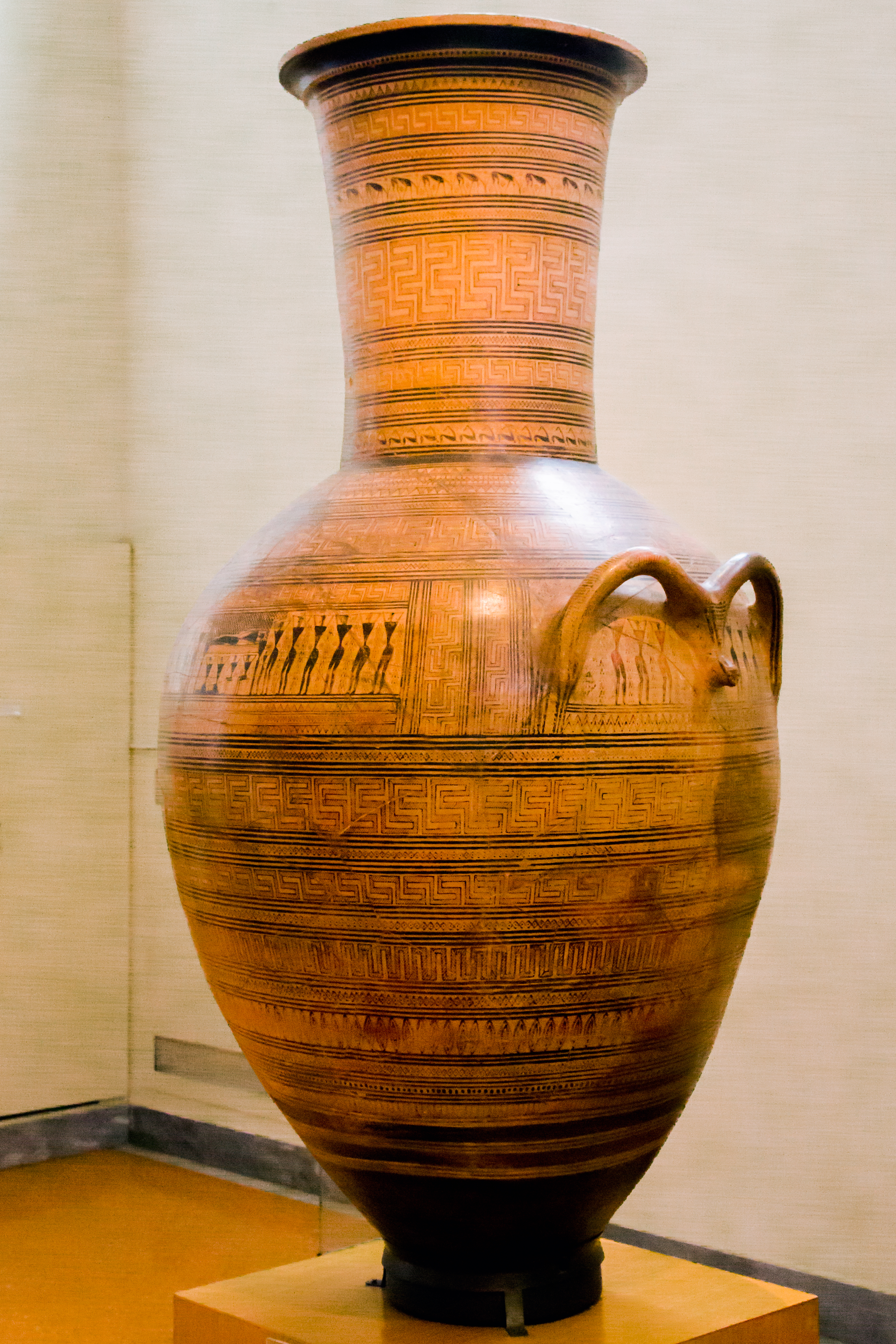 Anfora funeraria ateniese del tardo geometrico I. Decorazione con patterns geometrici, fregi animali sul collo, e scena di prothesis nella fascia all'altezza delle anse.